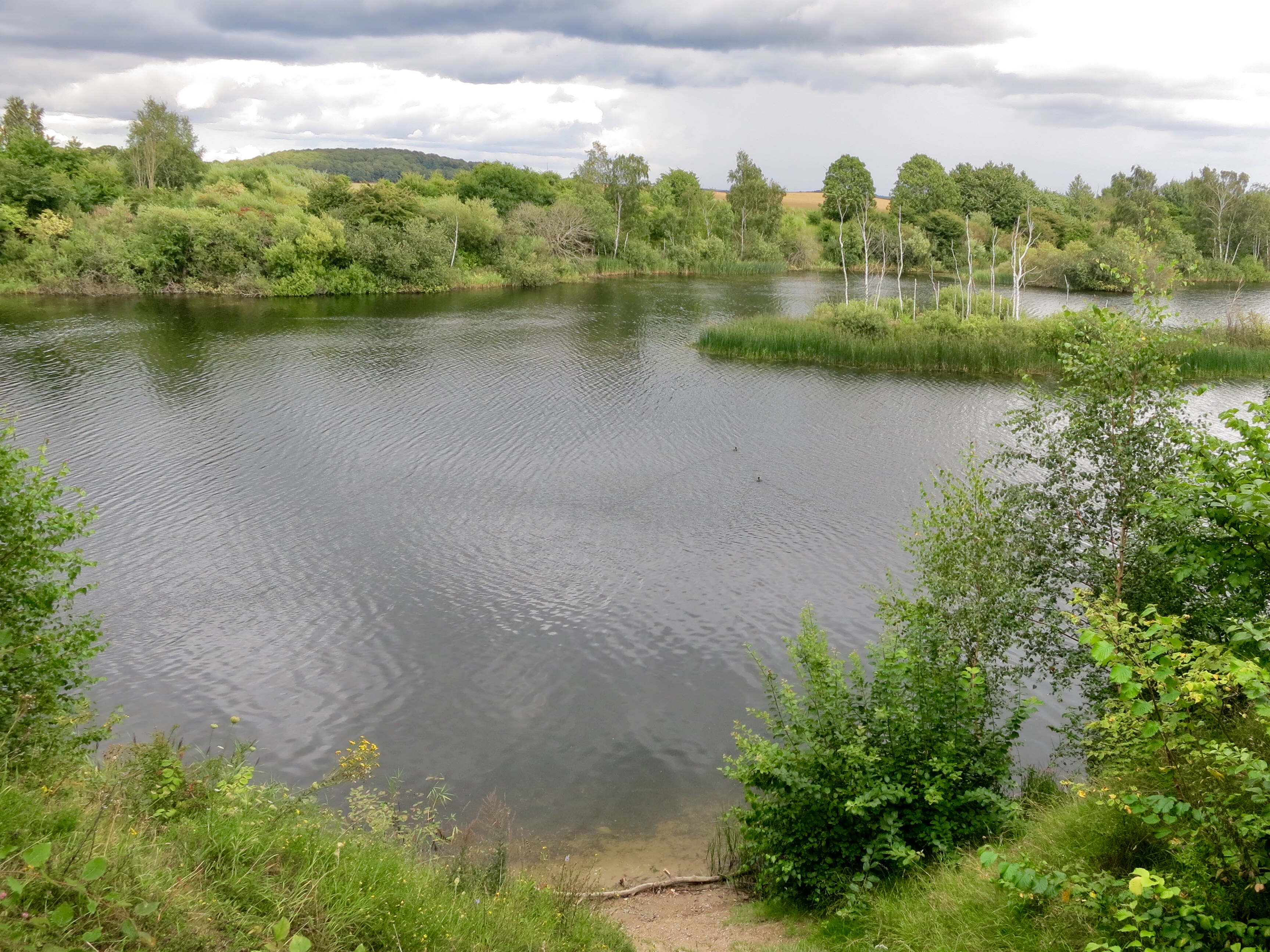 Arriesjön-Risebjär